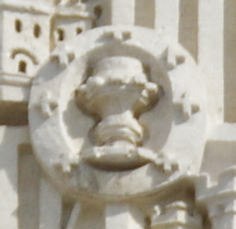 Escusón de Galiza no escudo de España da fachada do antigo Palacio de Comunicaciós de Madrid, hoxe denominado Palacio de Cibeles, que foi construído polo arquitecto galego Antonio Palacios Ramilo e inaugurado no ano 1919.